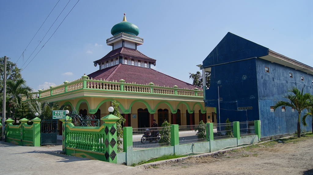 Masjid Thoriqul Jannah, Karangturi, Menganti